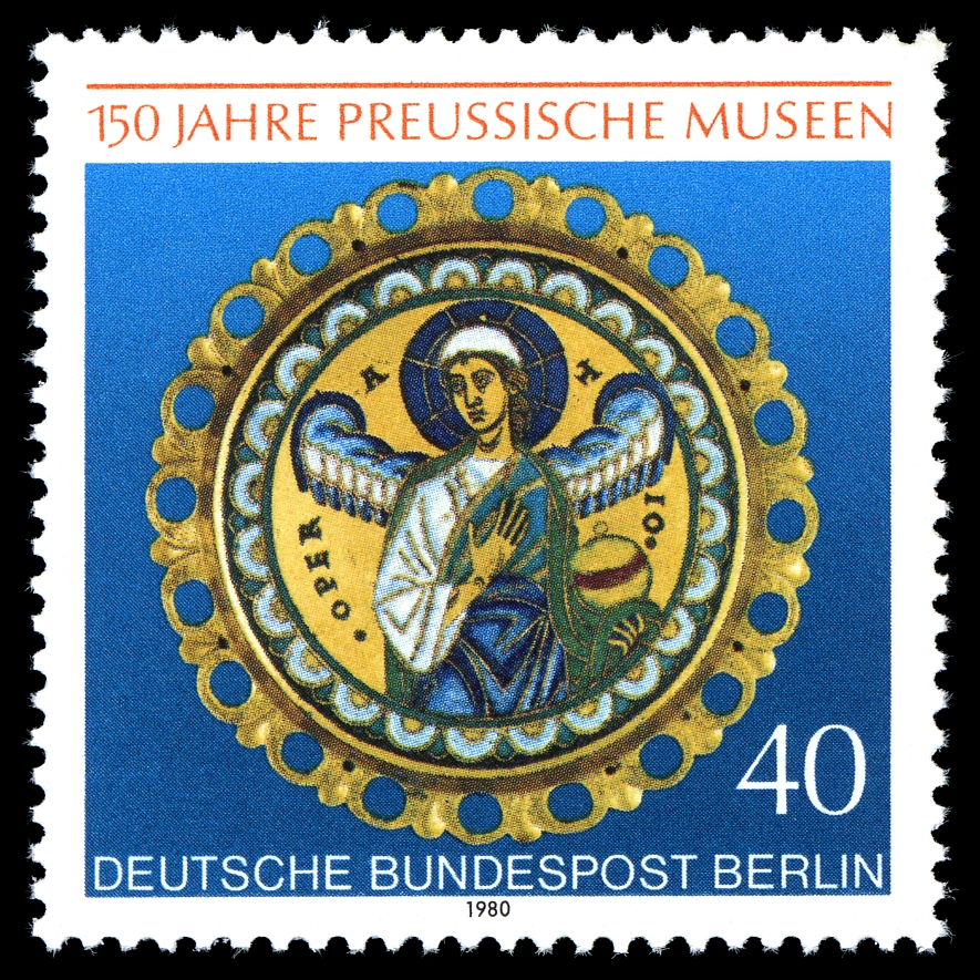 Sondermarke der Deutschen Bundespost Berlin (Medaillon mit Darstellung der OPERATIO vom ehemaligen Retabel des hl. Remaklus im Kloster Stablo; Maasland, um 1150, Grubenschmelz auf Kupfer, vergoldet; Kunstgewerbemuseum Berlin) Ausgabepreis: 40 Pfennig First Day of Issue / Erstausgabetag: 10. Juli 1980 Auflage: 10.110.000 Druckverfahren: Offsetdruck Michel-Katalog-Nr: Ländercode-MiNr: 627